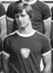 Title: Mannschaftsfoto BFC Dynamo Berlin Factual corrections and alternative descriptions are encouraged separately from the original description. Additionally errors can be reported at this page to inform the Bundesarchiv. Original historic description: ADN-ZB-Mittelstädt-17.8.78-ma-Berlin: Das Fußball-Oberligakollektiv des BFC Dynamo. Vorn von links: Michael Noack, Wolf-Rüdiger Netz, Bodo Rudwaleit, Reinhard Schwerdtner, Reinhard Lauck und Frank Terletzki. Mittlere Reihe von links: der verantwortlicher Oberligatrainer Jürgen Bogs, Hans-Jürgen Riediger, Norbert Trieloff, Roland Jüngling, Artur Ullrich, Detlef Helms, Peter Rohde, Dietmar Labes und Trainerassistent Martin Skaba. Hintere Reihe von links: Lutz Eigendorf, Bernhard Jonelat, Bernd Brillat, Olaf Seier, Hartmut Pelka, Rainer Troppa und Ralf Sträßer.